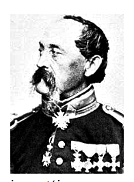 Philipp von Podewils, Erfinder des gleichnamigen Gewehrs (1809-1885)